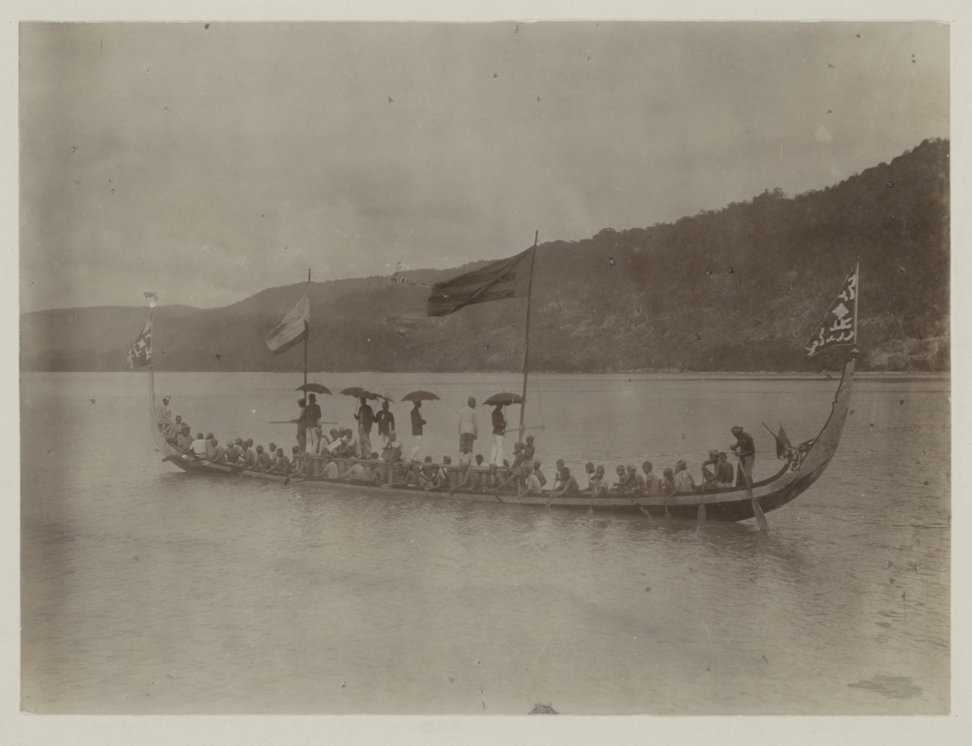 Academische Collecties: 1899-1900, Siboga-expeditie naar Nederlands Oost-Indië, onder leiding van Max Wilhelm Carl Weber